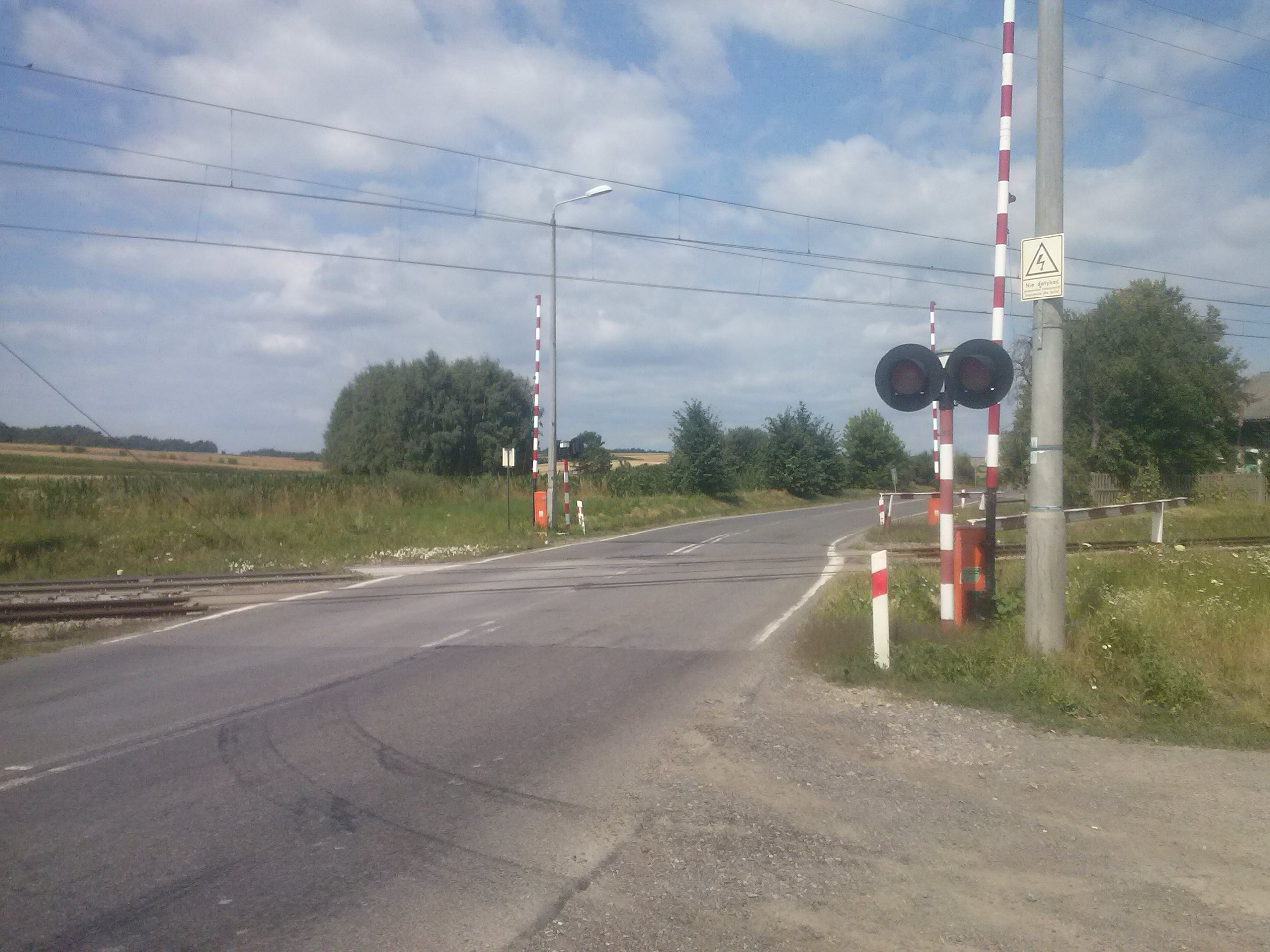 Przejazd kolejowy (linia Przeworsk-Rozwadów) na drodze krajowej nr 77, odcinek z Dębna (Poręby) do Wierzawic